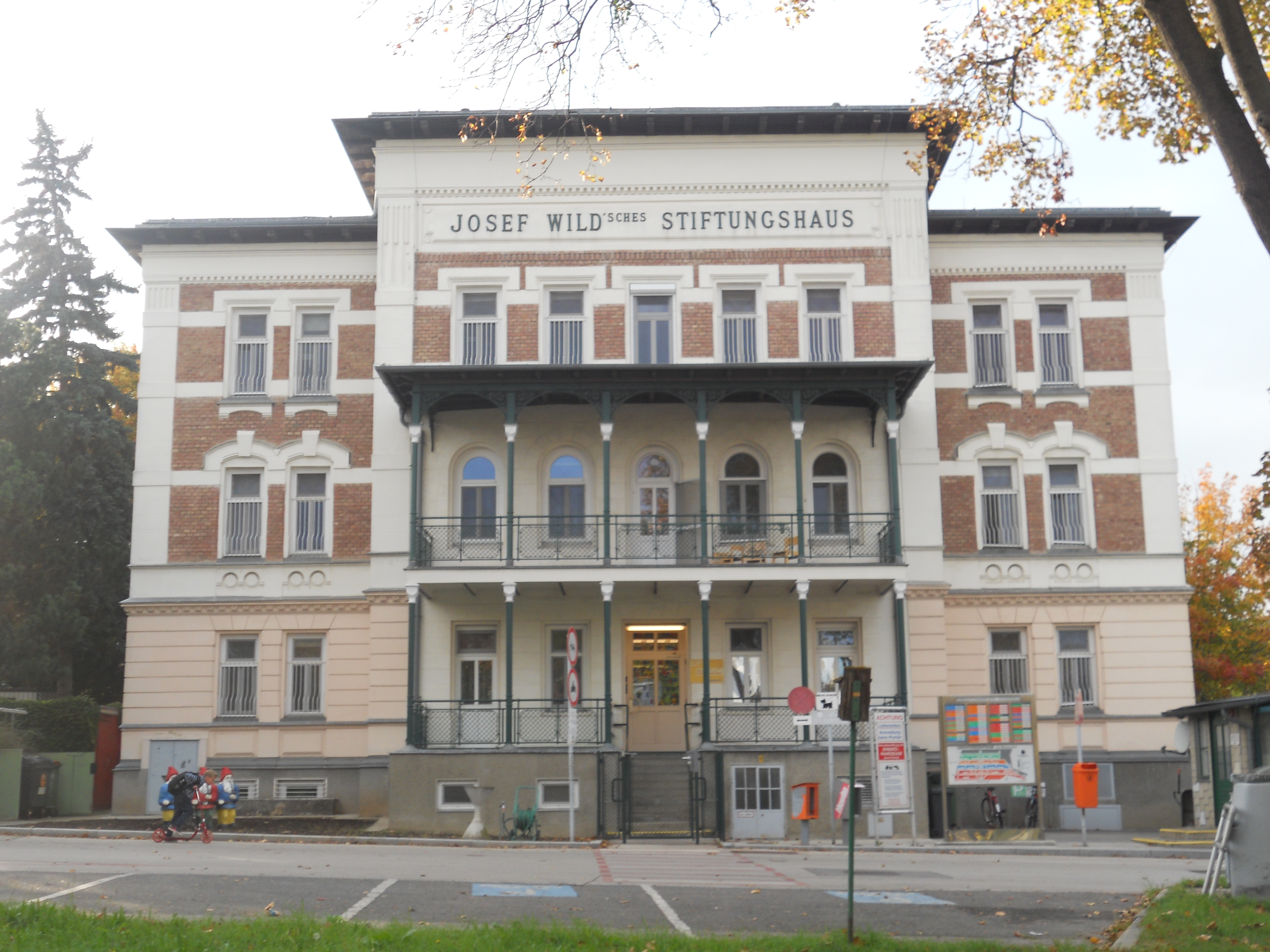 Geriatriezentrum Am Wienerwald, Josef Wild'sches Stiftungshaus (Pavillon XX)